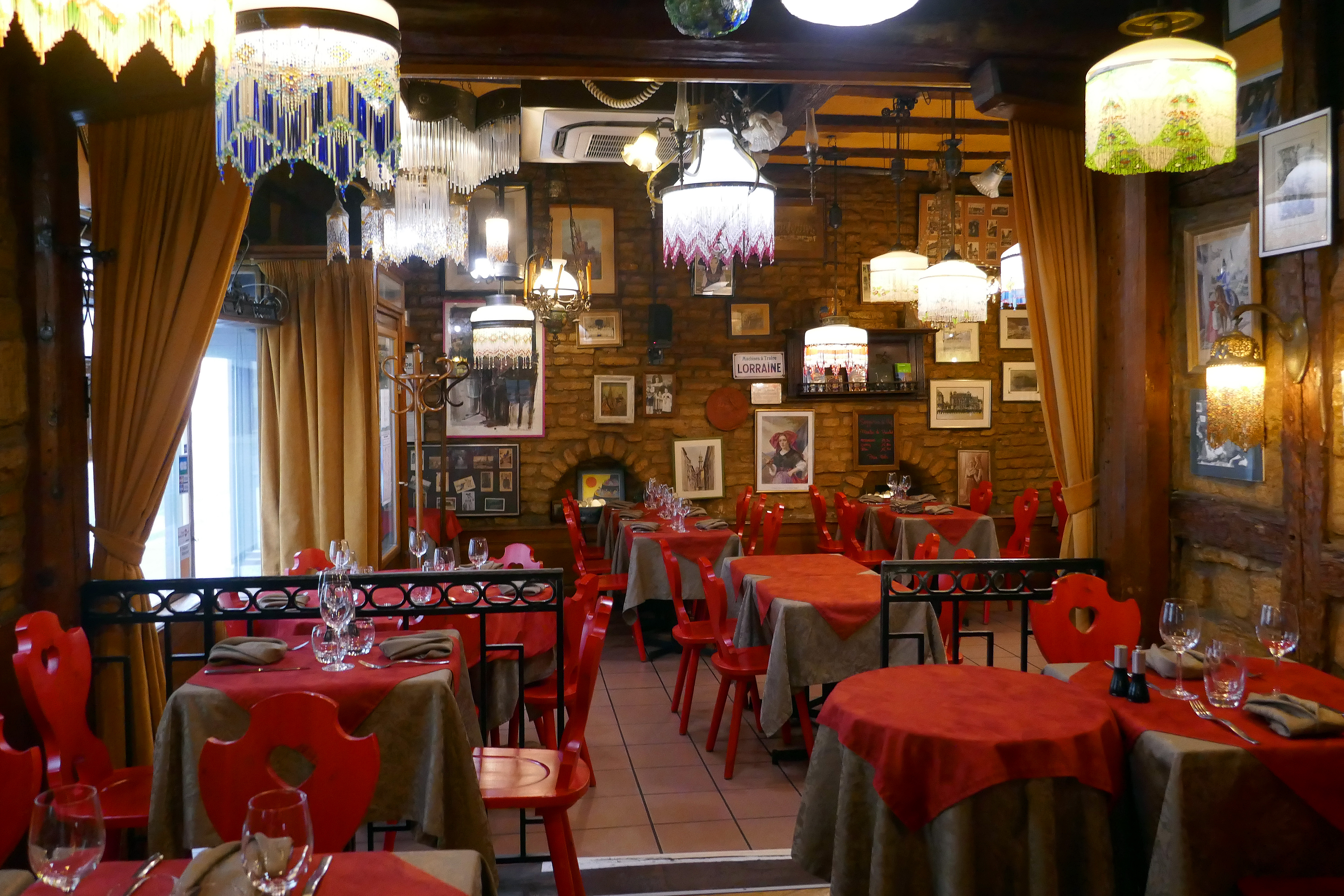 La Choucrouterie (Strasbourg) : une salle du restaurant.